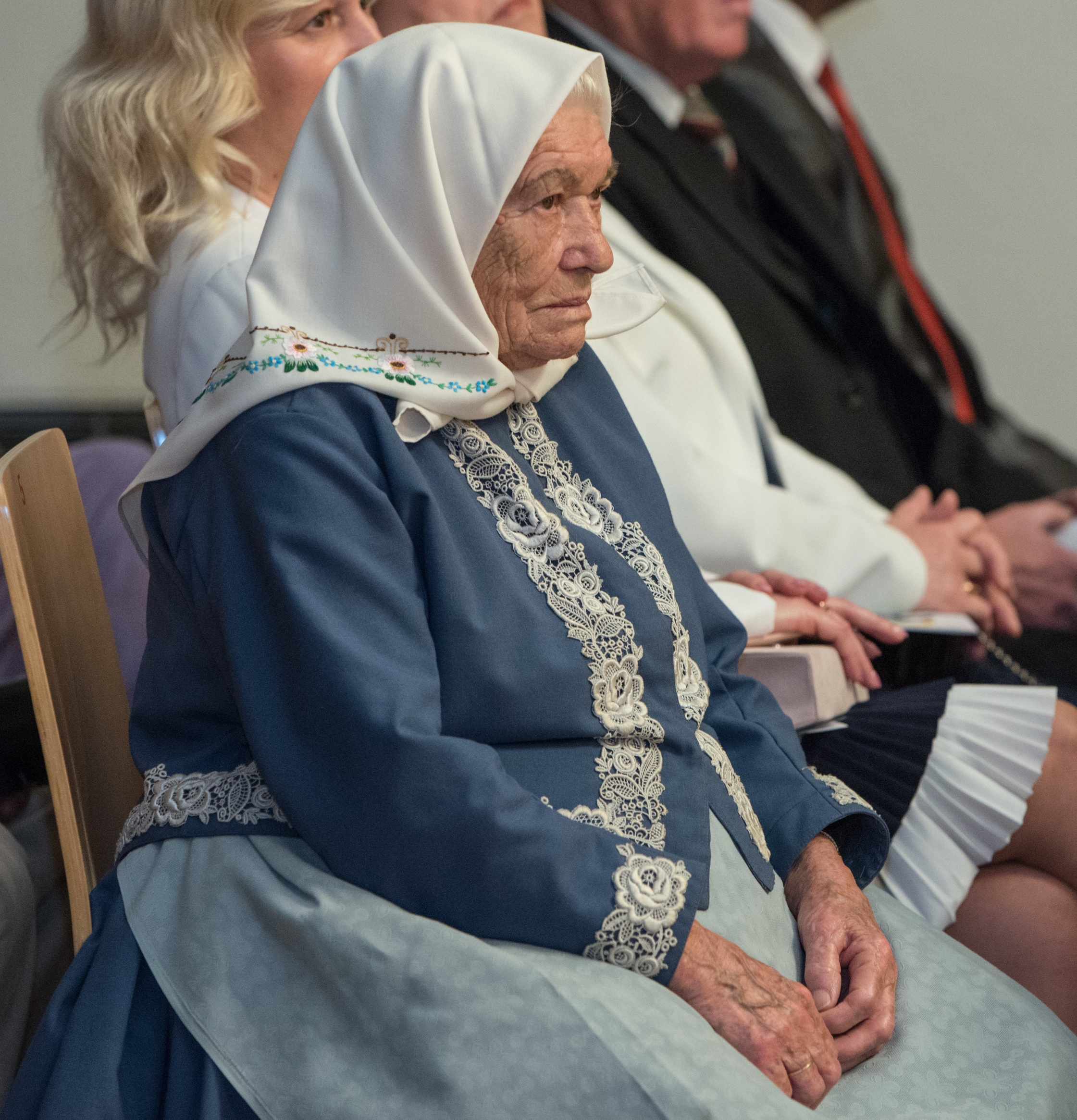 Růžena Komosná (2018)